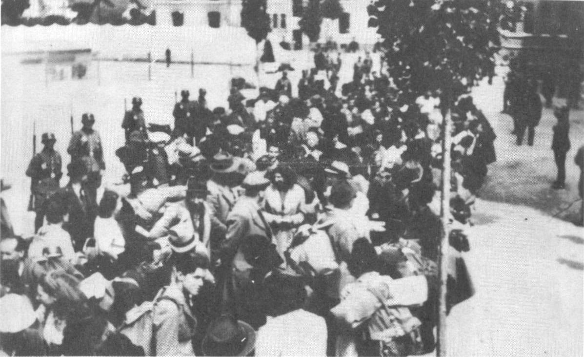 Slovenski izgnanci na dvorišču taborišča v Mariboru pred odhodom na železniško postajo v začetku julija 1941.